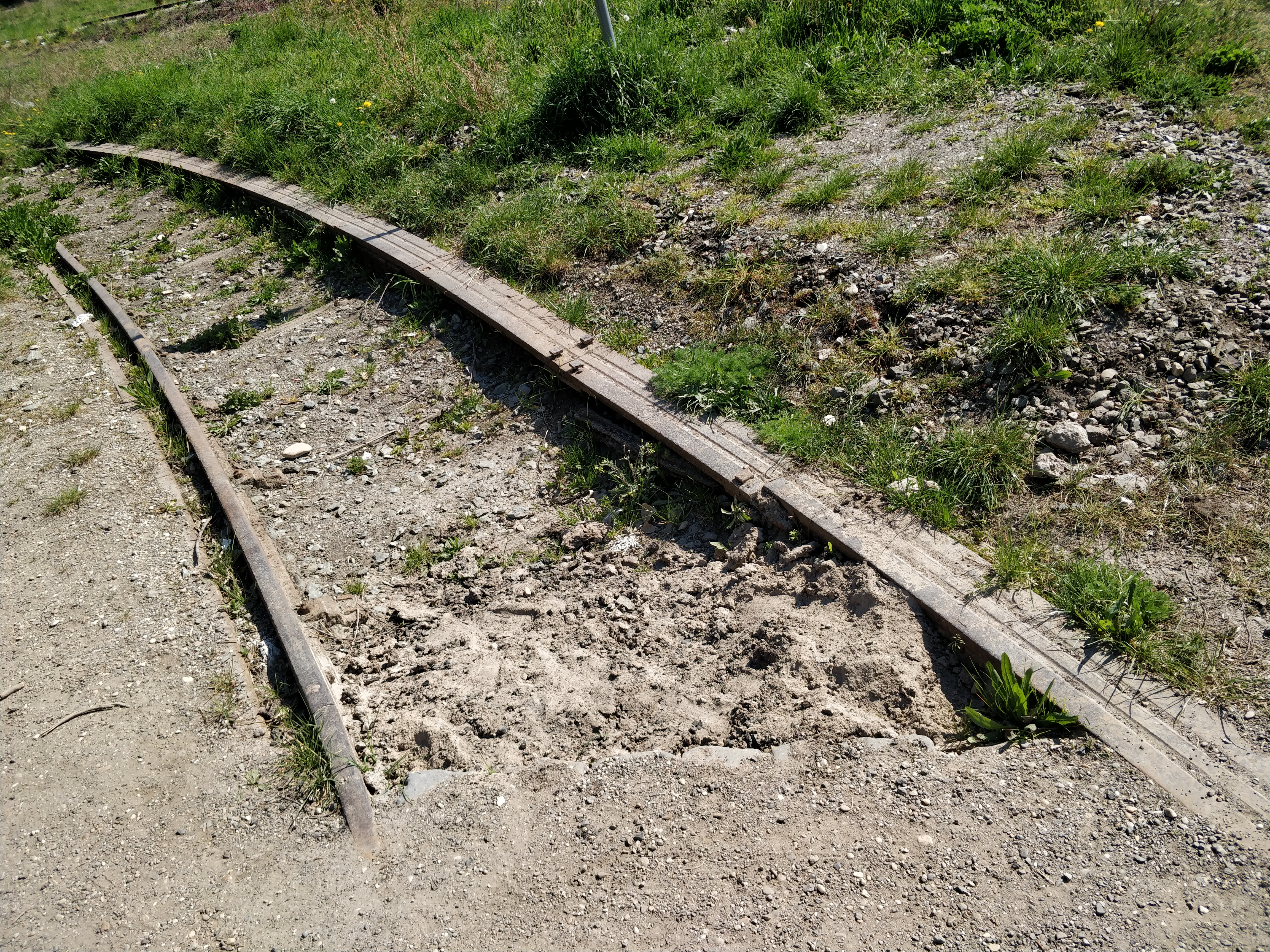 Rohlederova kolajnica Bratislava filialka